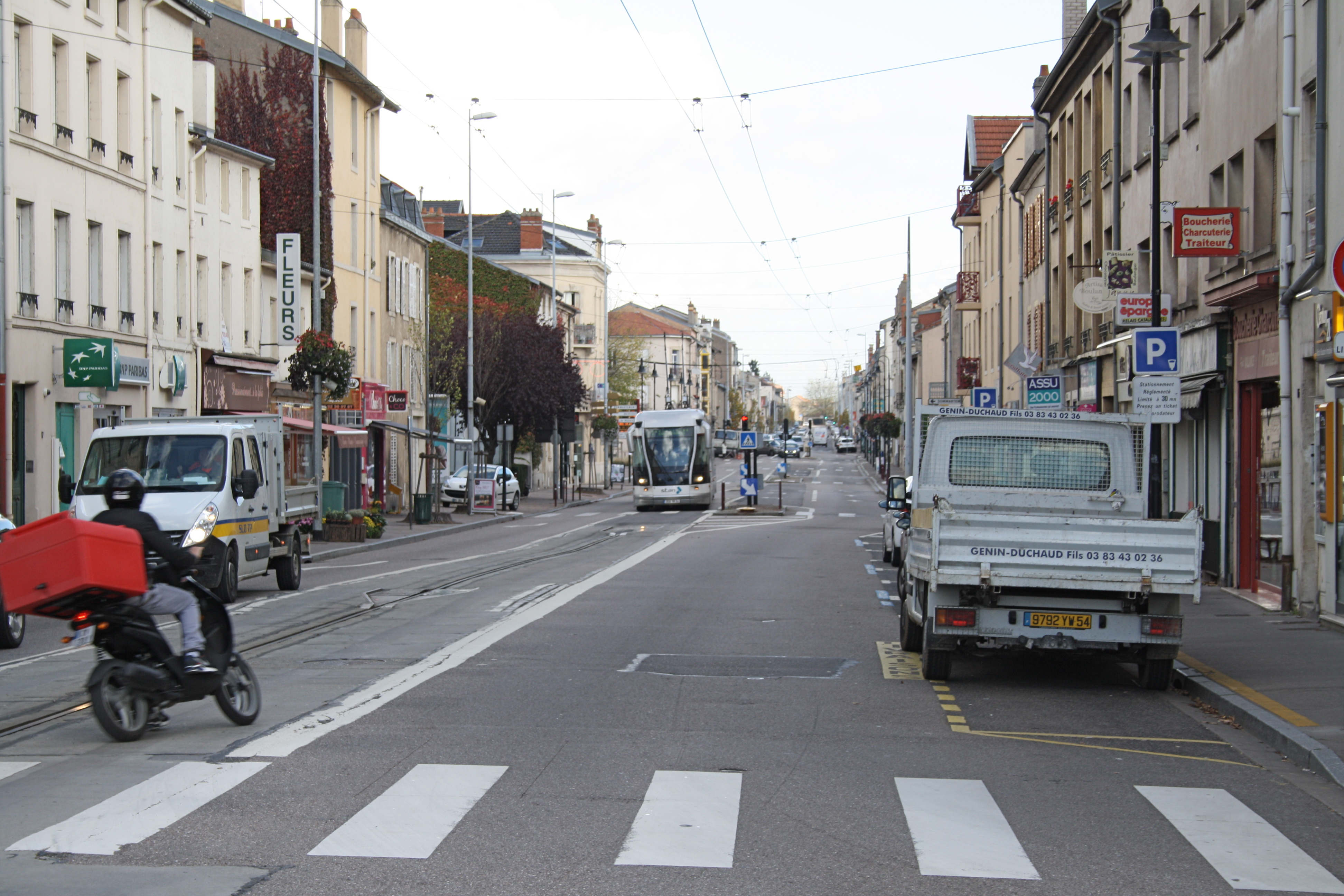 Av. Carnot à Saint-Max